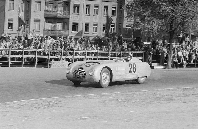 Original image description from the Deutsche FotothekHeinz Melkus in einem Veritas 1500ccm-Sportwagen beim 6. Leipziger Stadtparkrennen